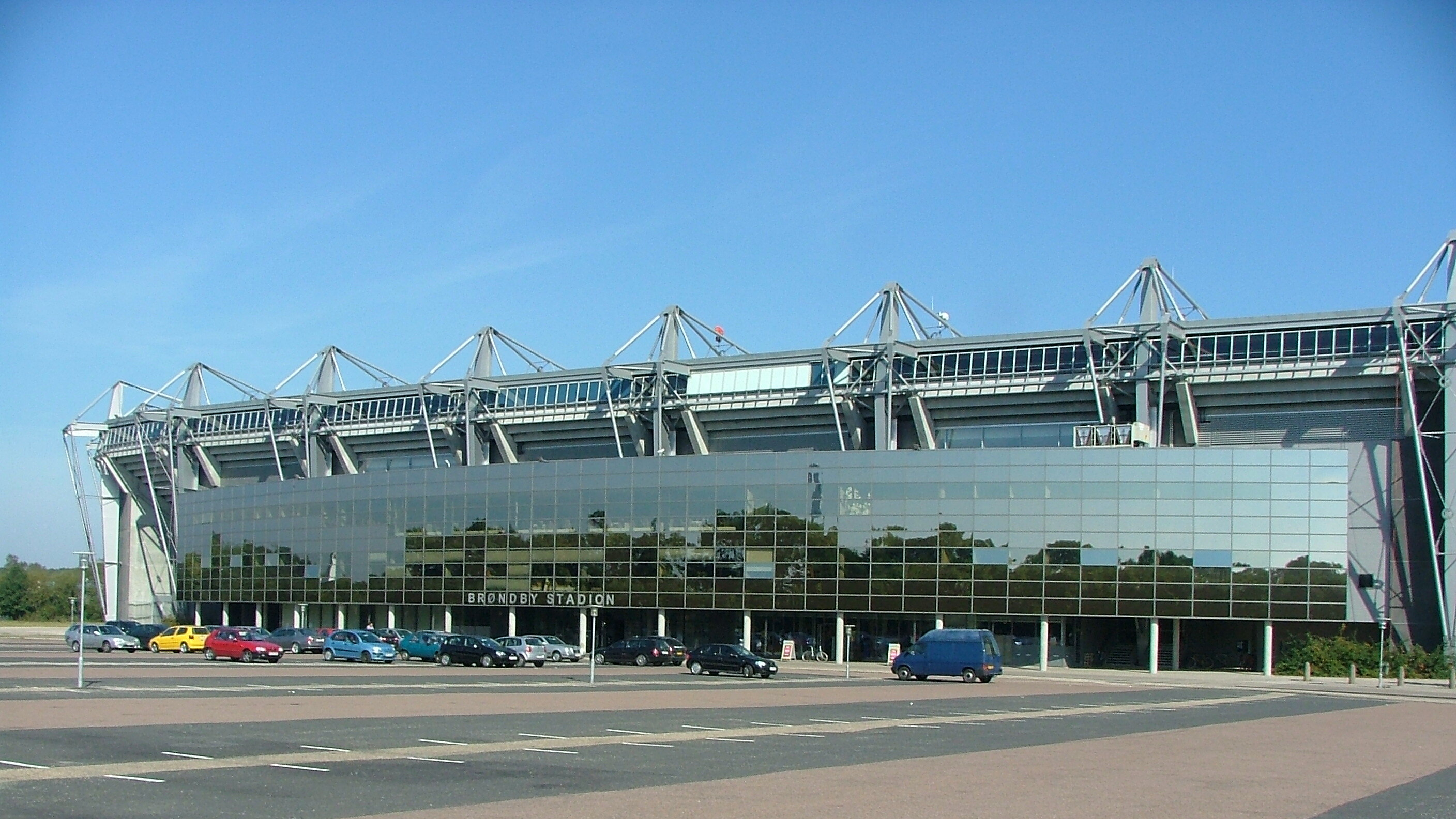 Brøndby Stadion, Brøndby, Denmark